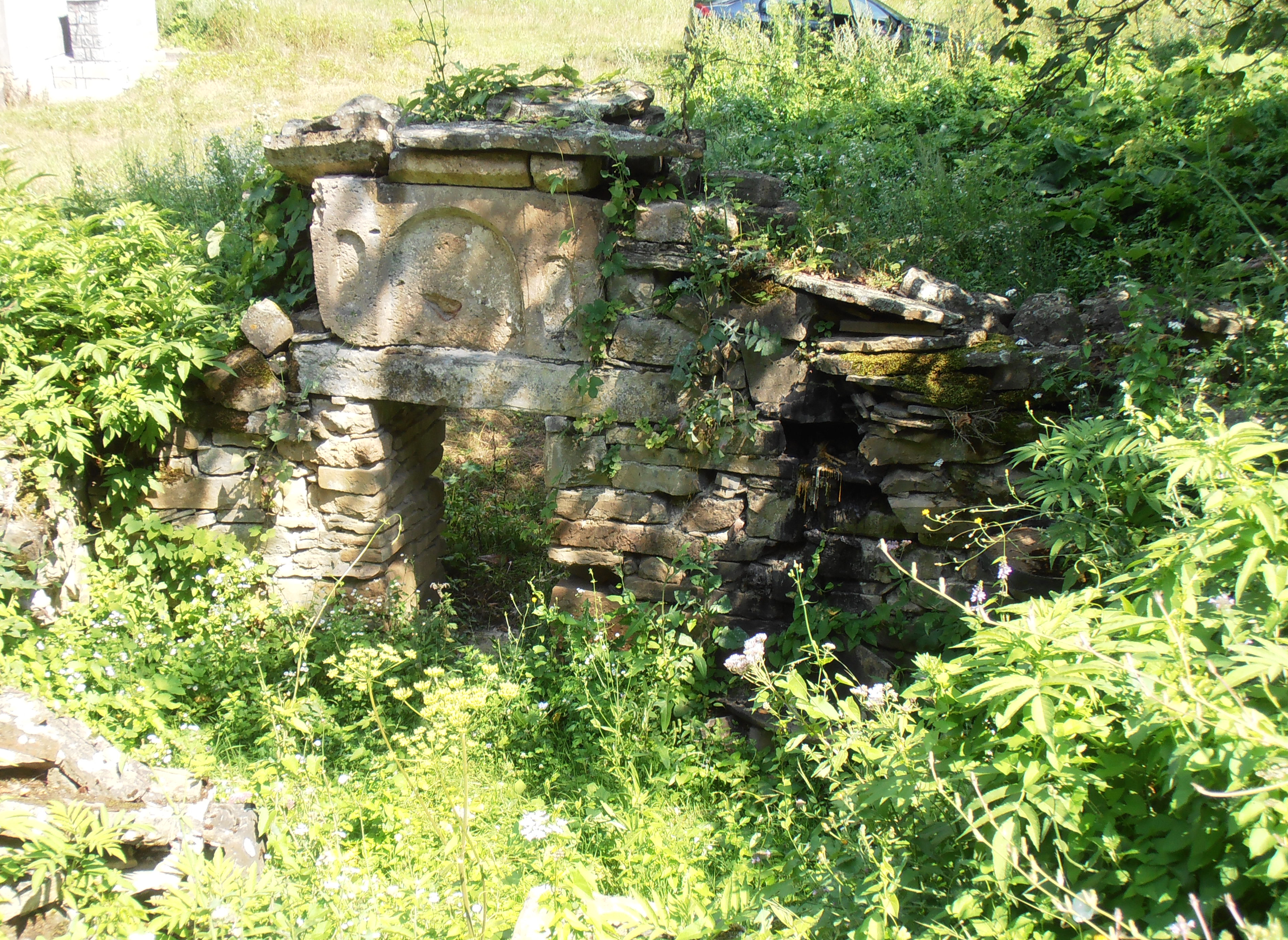 Српски (ћирилица): Дрен (Лепосавић) - остаци цркве